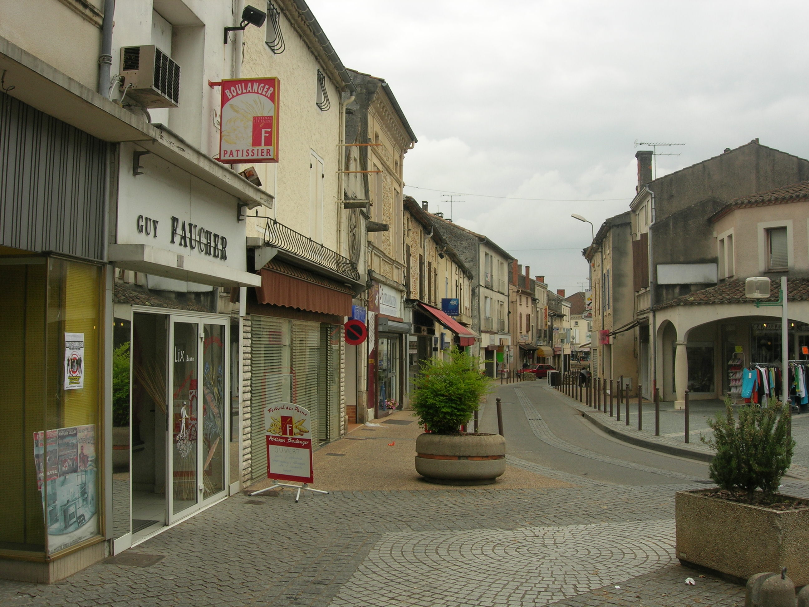 la rue Nationale